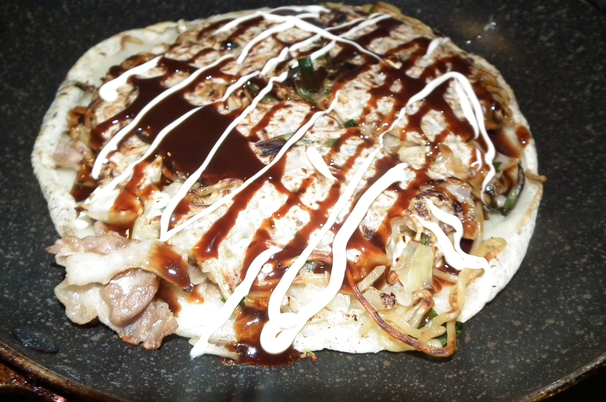 Modern-yaki 関西風モダン焼き